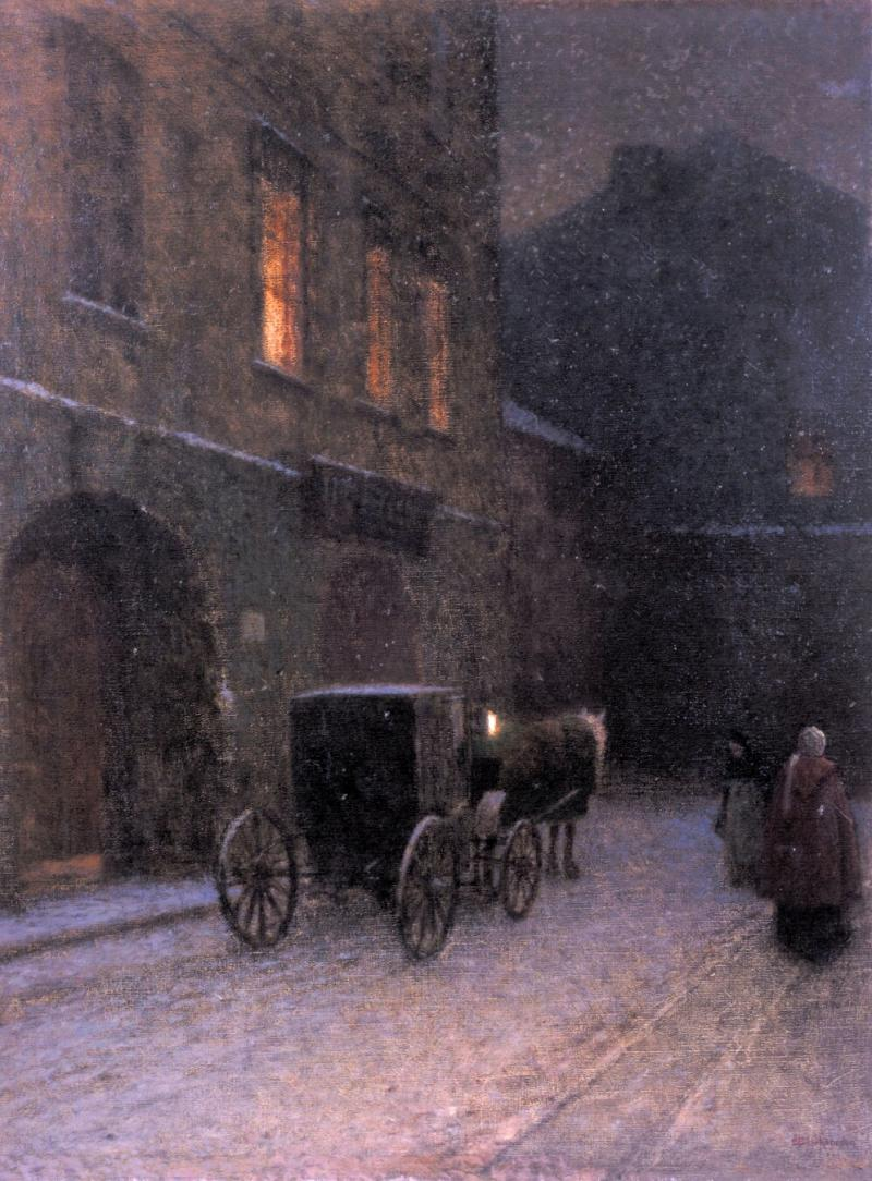 Staropražská zákoutí